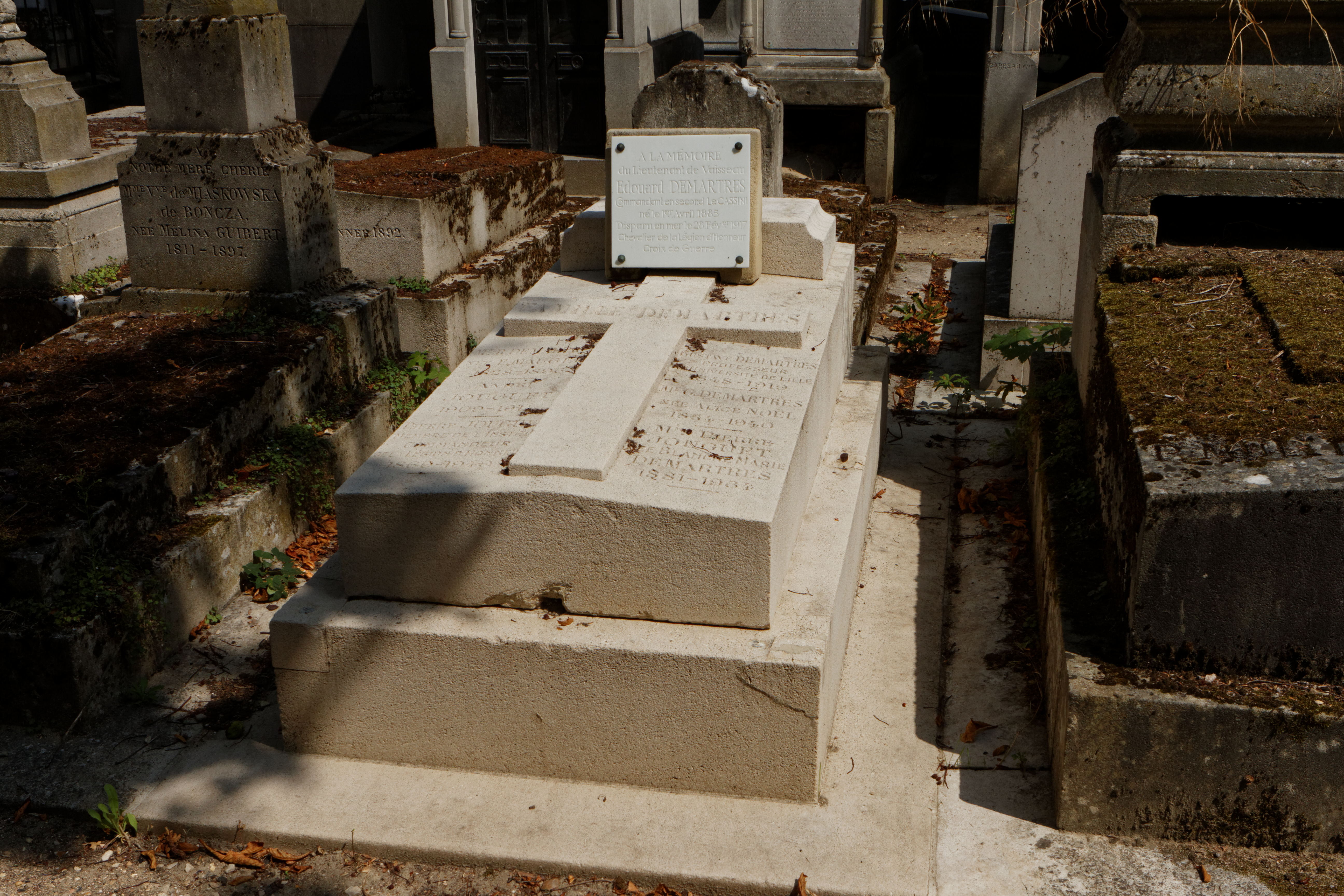 Sépulture de Gustave Demartres (1848-1919), mathématicien et doyen honoraire de la Faculté des sciences de Lille ; Pierre Jouguet (1869-1949), helléniste, archéologue, épigraphiste et historien de l'Égypte ptolémaïque et romaine.